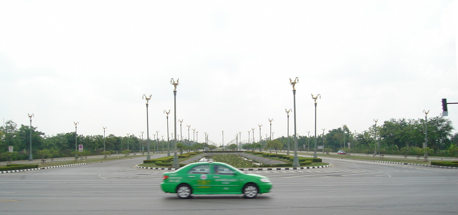 Buddhamondon